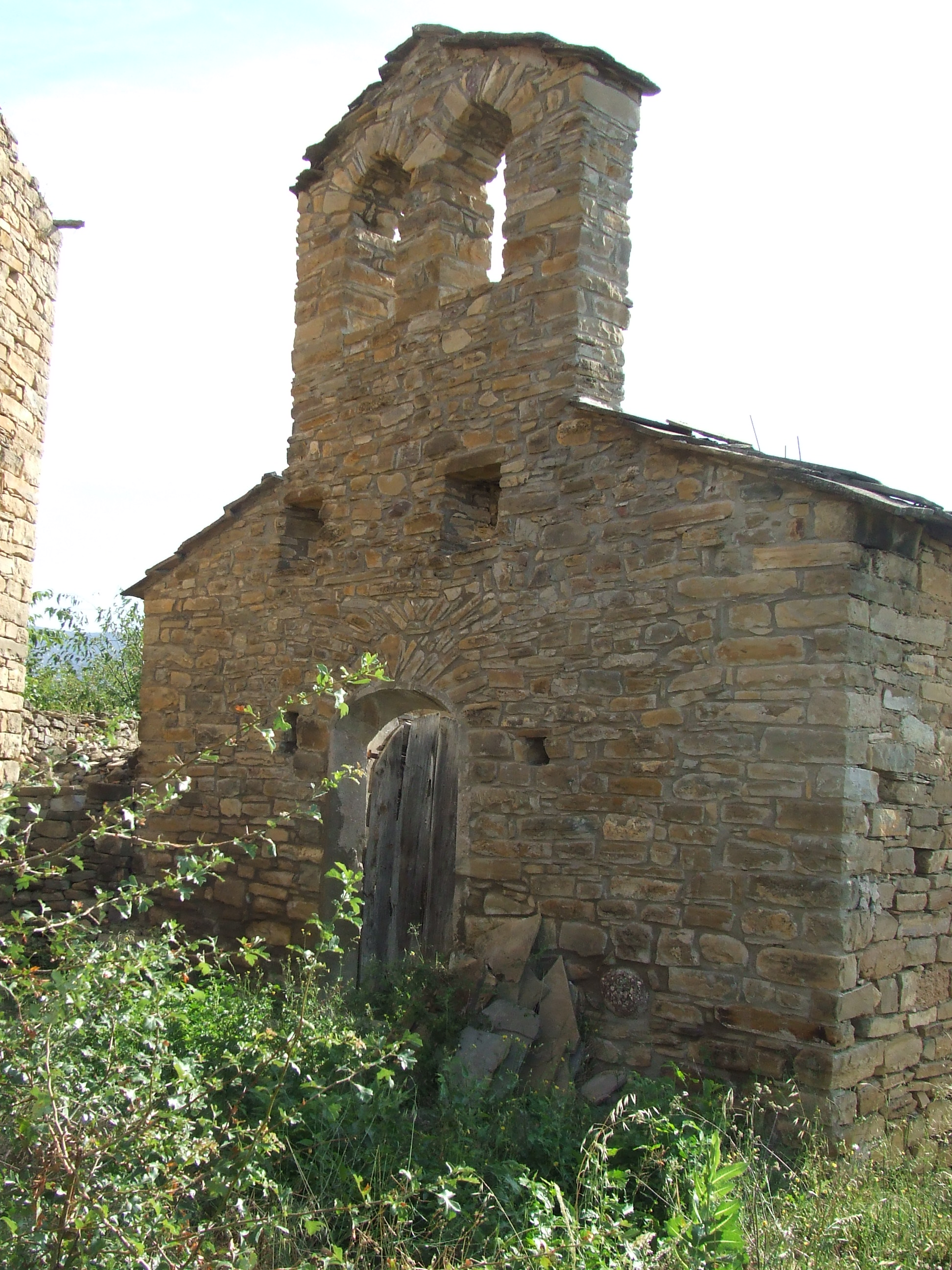 Façana oest de Sant Cristòfol de Puimanyons (la Pobla de Segur, Pallars Jussà)